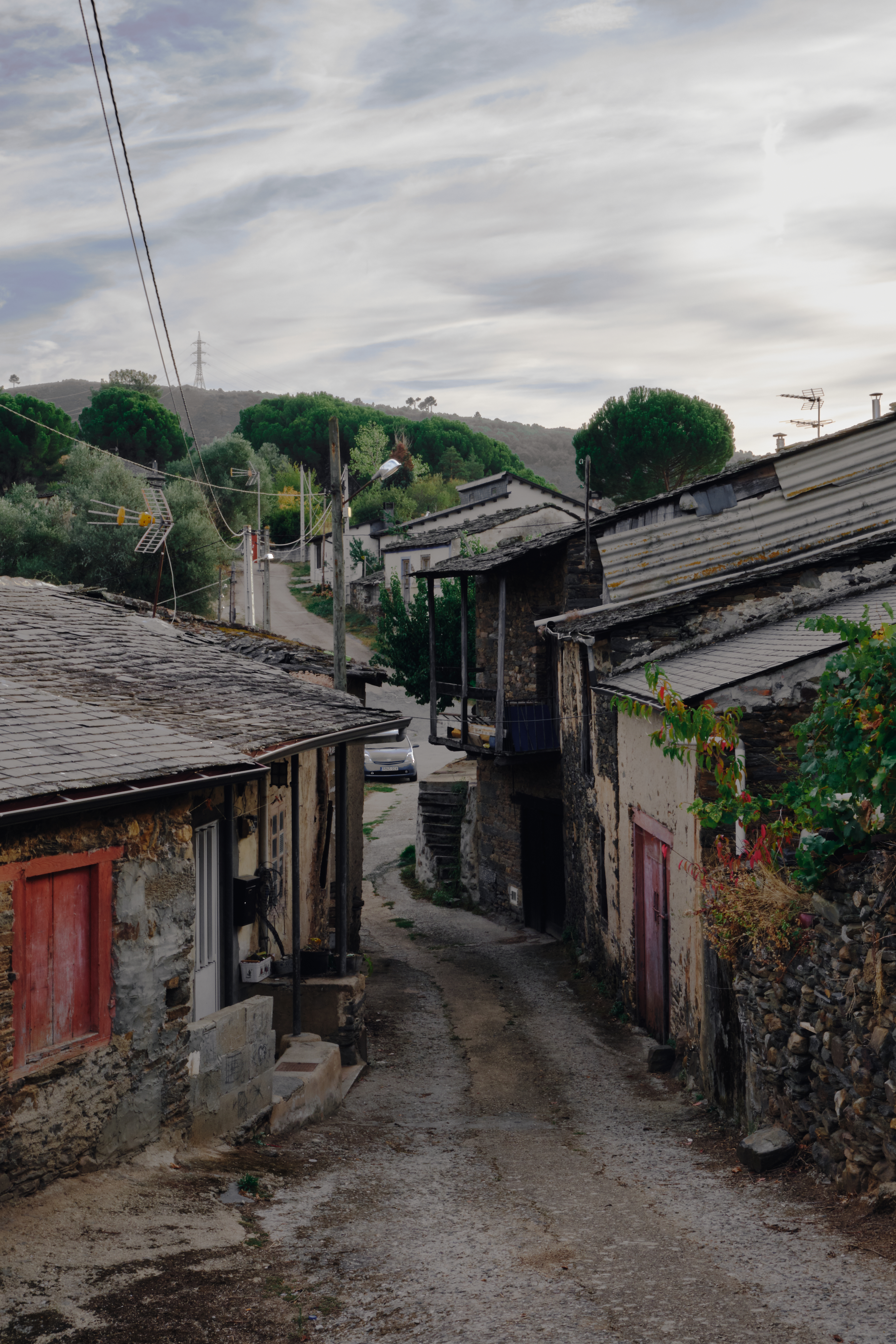 Imaxe do Camiño de Abaixo, Santa María